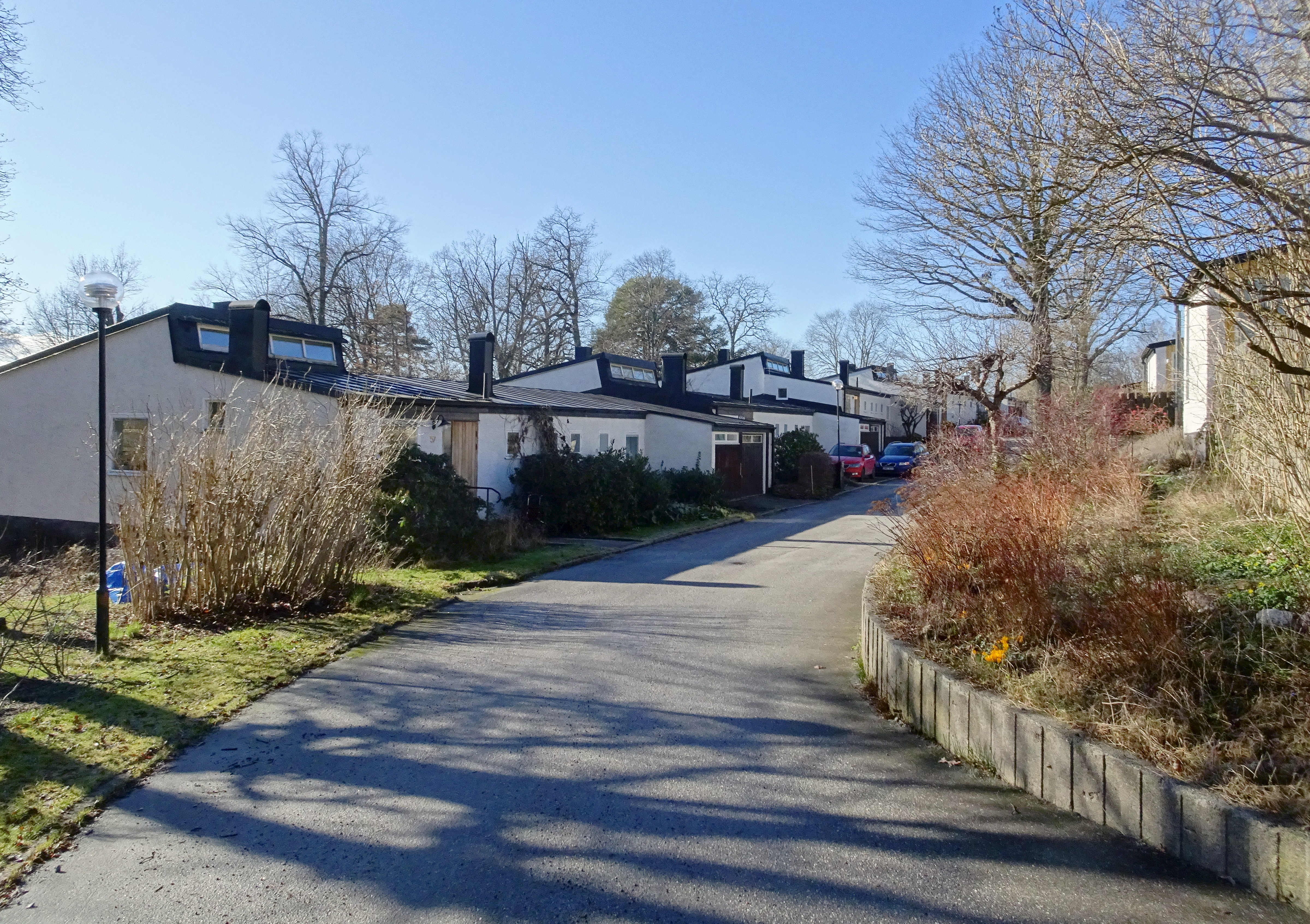 Radhusområdet Sjöträdgården, Hässelby strand, byggår 1957-1958 Alf Bydén (Arkitekt) Bostadsrättsföreningen Sjöträdgården (Byggherre) Bo Stigwall (Byggmästare) Dag Åberg (Arkitekt) Eric Anjou (Trädgårdsarkitekt)